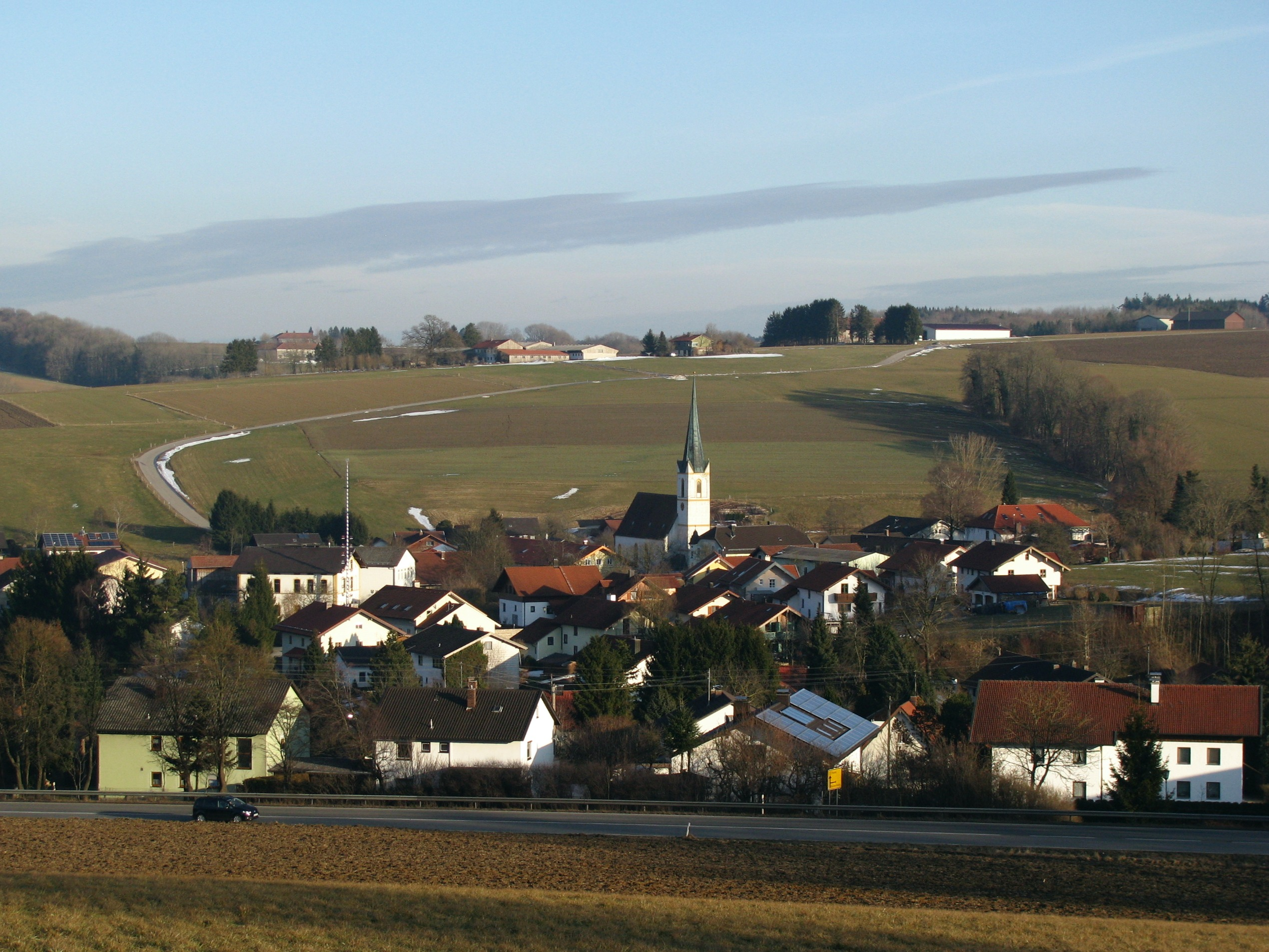 Reichertsheim im Landkreis Mühldorf am Inn; im Vordergrund die Bundesstraße 12